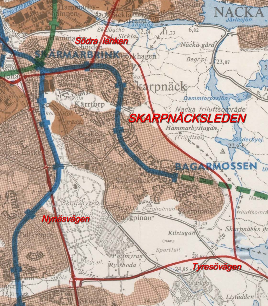 Sträckning för den planerade men aldrig byggda Skarpnäcksleden (röd)